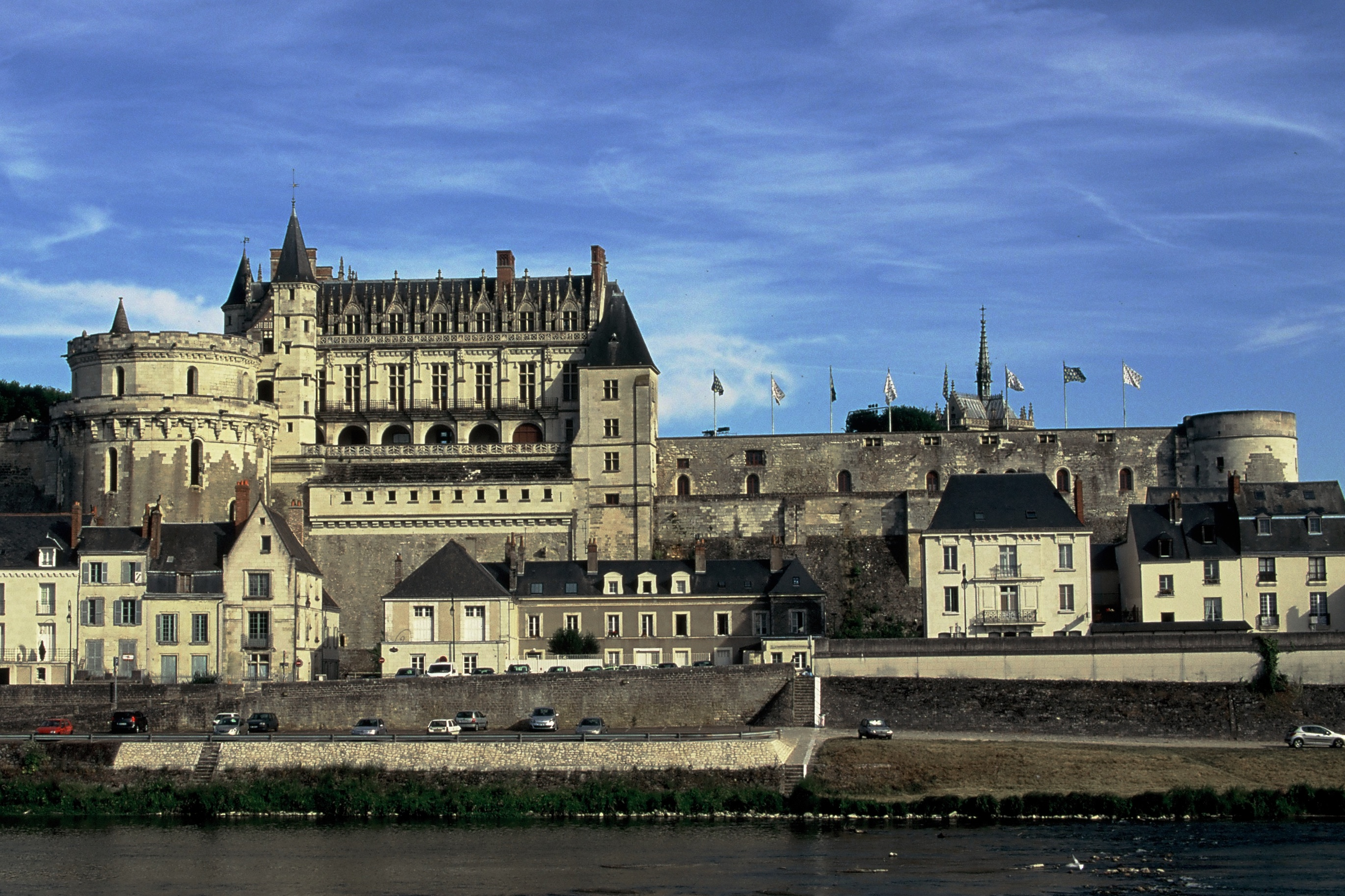 Château d'Amboise depuis l'île d'Or